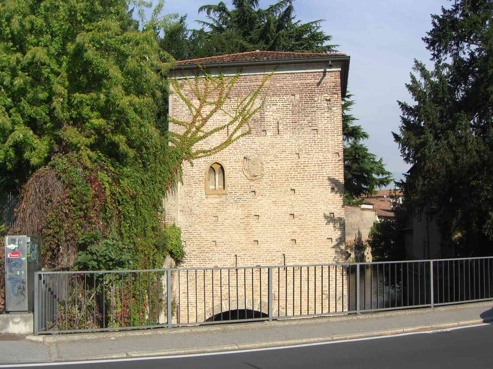 Monza torre viscontea sul Lambro in via Azzone Visconti